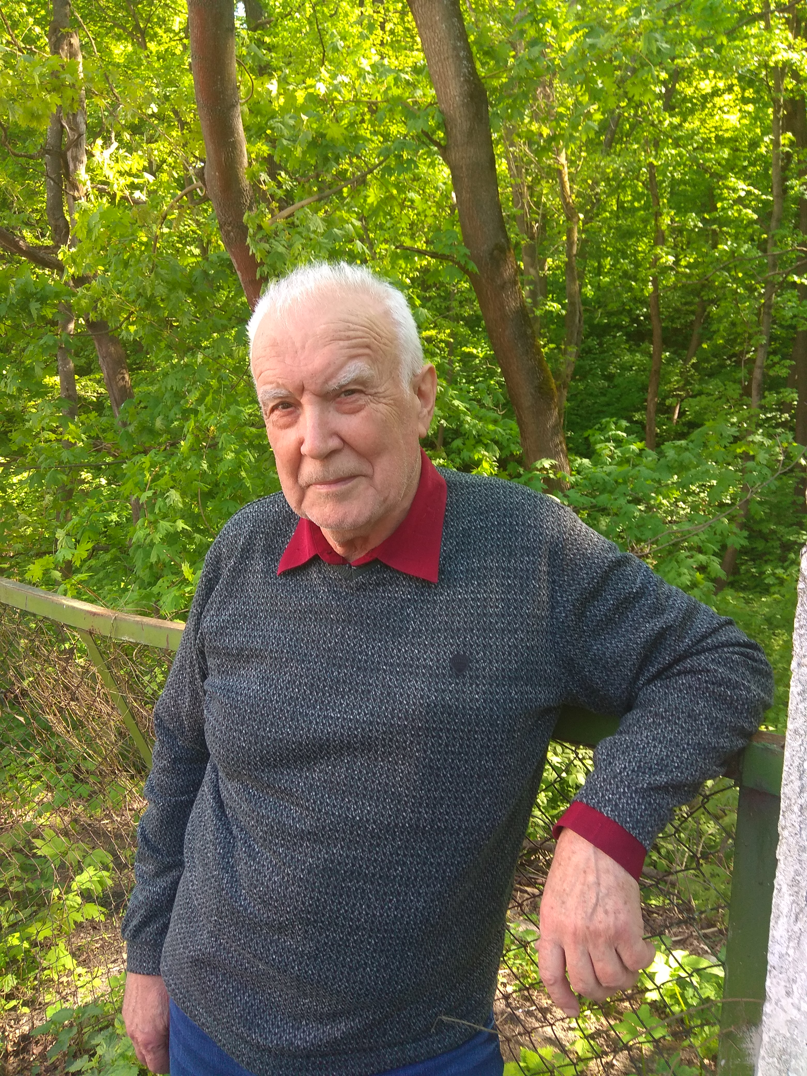 В санатории имени М. Горького